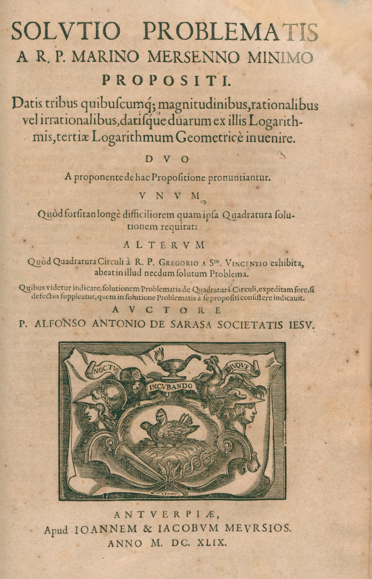 Frontespizio